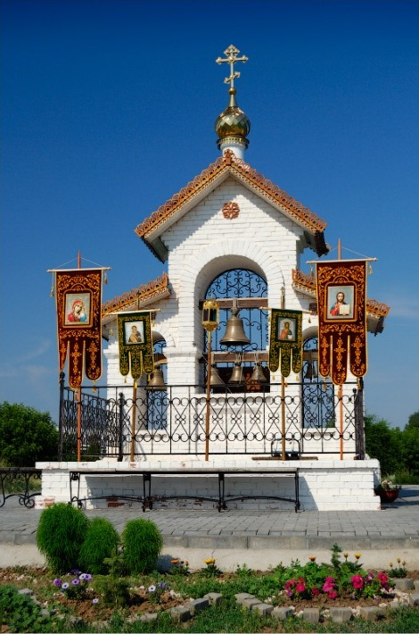 Звонница Нижне-Воскресенского монастыря, Саратовская область